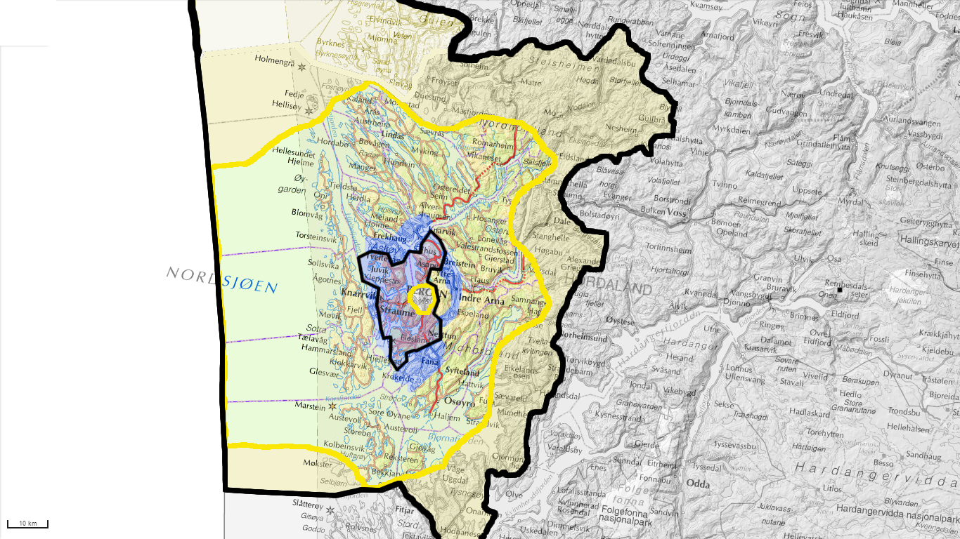 Strilelandet ligg mellom dei to gule grensene. Dette er om vi avgrensar strilen etter kor langt det er muleg å ro på ein dag. Ror ein i 3 knop i 10 timar, når ein 30 nautiske mil eller ca 55 km frå bykjernen. Det må seiast å vera det absolutt lengste det er praktisk muleg å ro samanhengande på ein "dag" under optimale tilhøve. Grensa mot Bergen by er kommunegrensa frå 1837, med tillegg av områda Møhlenpris, Nygård og Kalfaret, som fram til 1877 hørte til Bergen landdistrikt. Den ytre svarte streken omfattar resten av kommunane Austrheim, Vaksdal, Samnanger, Fusa, Tysnes og Austevoll, heile kommunane Modalen, Masfjorden og Fedje, og tidlegare Eivindvik prestegjeld i Gulen kommune. Dette blir Strilelandet om ein avgrensar det ut frå litt andre kriteria, og tar med heile distrikta Nordhordland og Midthordland, med tillegg av Eivindvik i Sogn og Tysnes i Sunnhordland. Det blå området er der i dag (2015) bergensk er den dominerande dialekten både blant vaksne og barn. I dette området blir det nesten utelukkande brukt bokmål i skule, kommunal forvaltning og næringsliv. Innanfor den svarte linja er bergensk klart dominant, i dei blå områda like utanfor streken held bergensk på å erobra terreng mot strilemålet i alle aldersgrupper. Strilelandet nærmast utanfor den svarte grensa blir av "nynorskfolket" (målrørsla) kalt "randsona", der har nynorsken dei siste tiåra gått sterkt tilbake som skulemål. Her blir bokmål brukt stadig meir, særleg i næringslivet. I resten av Strilelandet er nynorsken sin situasjon tryggare. Norwegian maps are released for free non-commercial use. I modified the original file. © Kartverket (CC BY 4.0) License